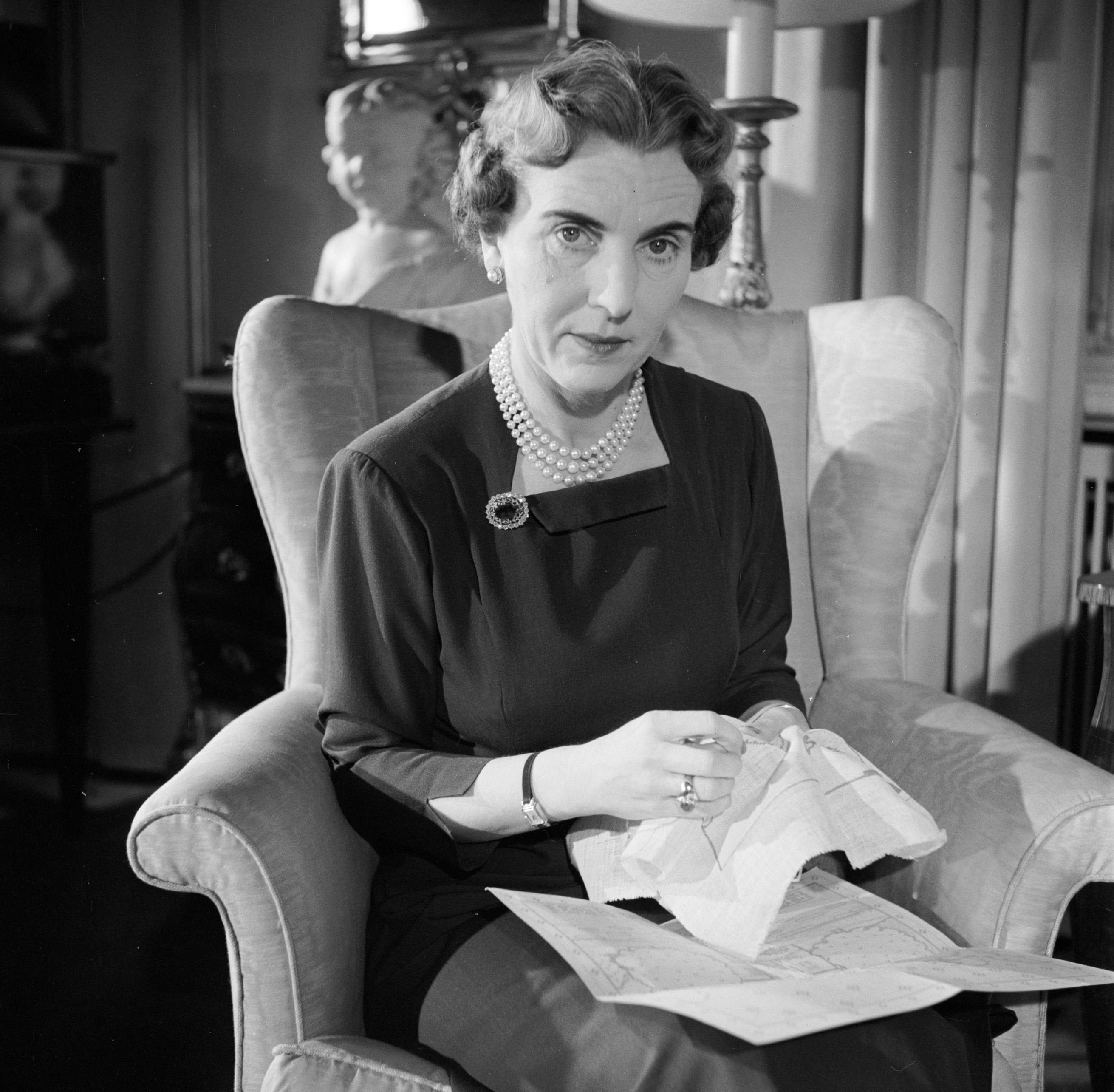 Collectie / Archief : Fotocollectie Van de Poll Reportage / Serie : Gezinsfoto's van de Deense koninklijke familie Beschrijving : Deense Koningin bordurend in haar woning in paleis Brockdorff in Slot Amalienborg Datum : maart 1954 Locatie : Denemarken, Kopenhagen Trefwoorden : borduren, interieurs, koninginnen, meubilair, paleizen, stoelen Persoonsnaam : Ingrid (koningin Denemarken) Fotograaf : Poll, Willem van de, [onbekend] Auteursrechthebbende : Nationaal Archief Materiaalsoort : Negatief (zwart/wit) Nummer archiefinventaris : bekijk toegang 2.24.14.02 Bestanddeelnummer : 252-8635